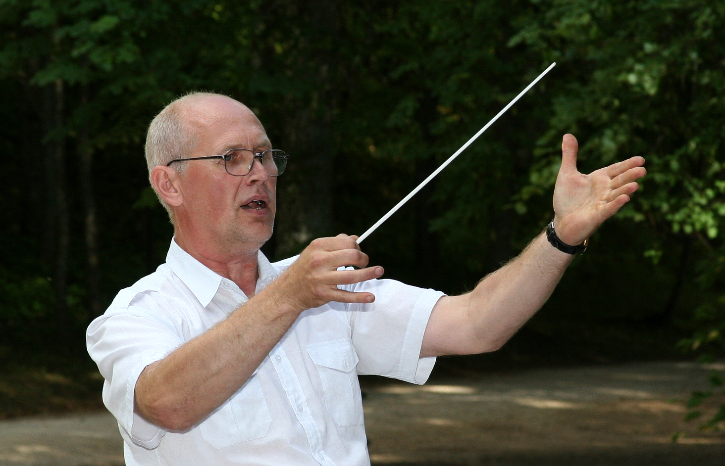 Arno Anton, Pühajärve Puhkpillipäevad